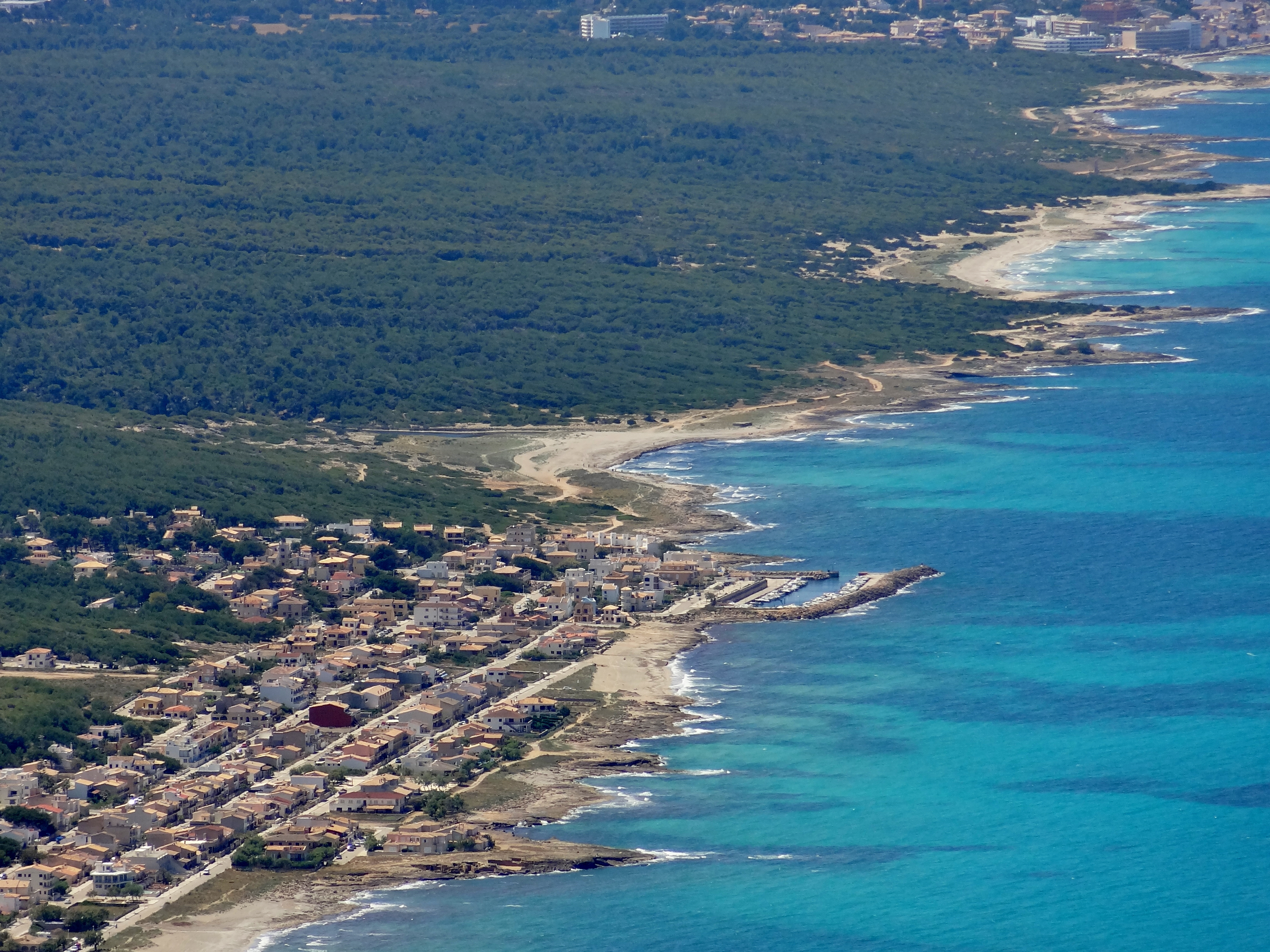 Küste von Son Real zwischen Son Serra de Marina und Can Picafort mit der Mündung des Torrent de Son Real in der Gemeinde Santa Margalida, Mallorca, Spanien